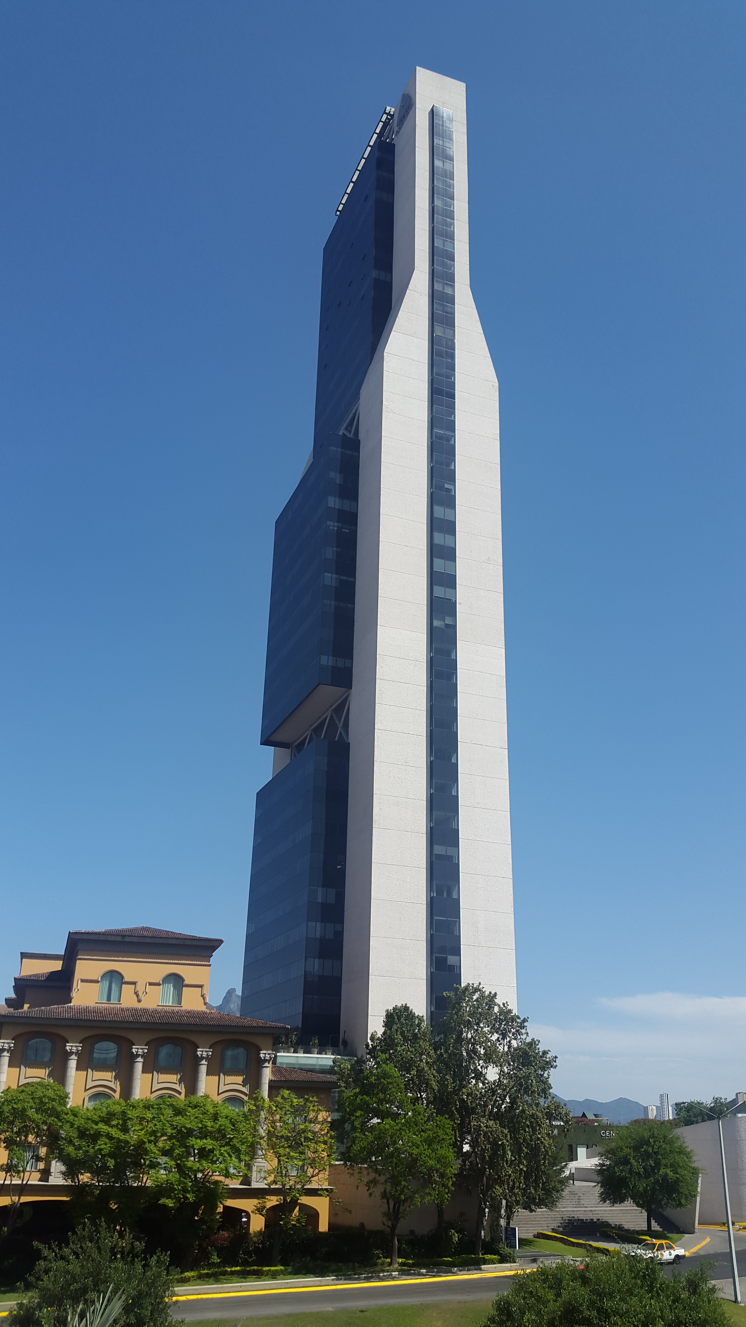 Asombroso edifico de San Agustín